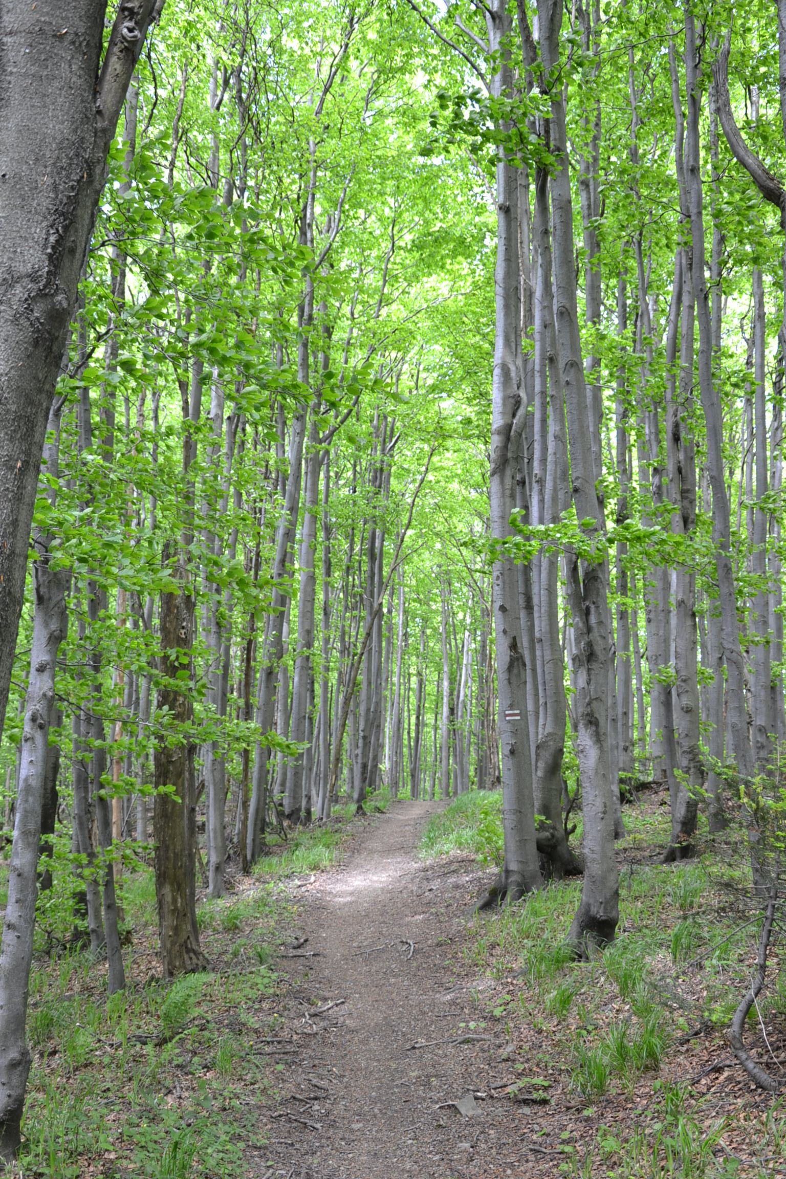 Bieszczady Zachodnie: późnowiosenny aspekt lasu bukowego na grzbiecie Wołosani.